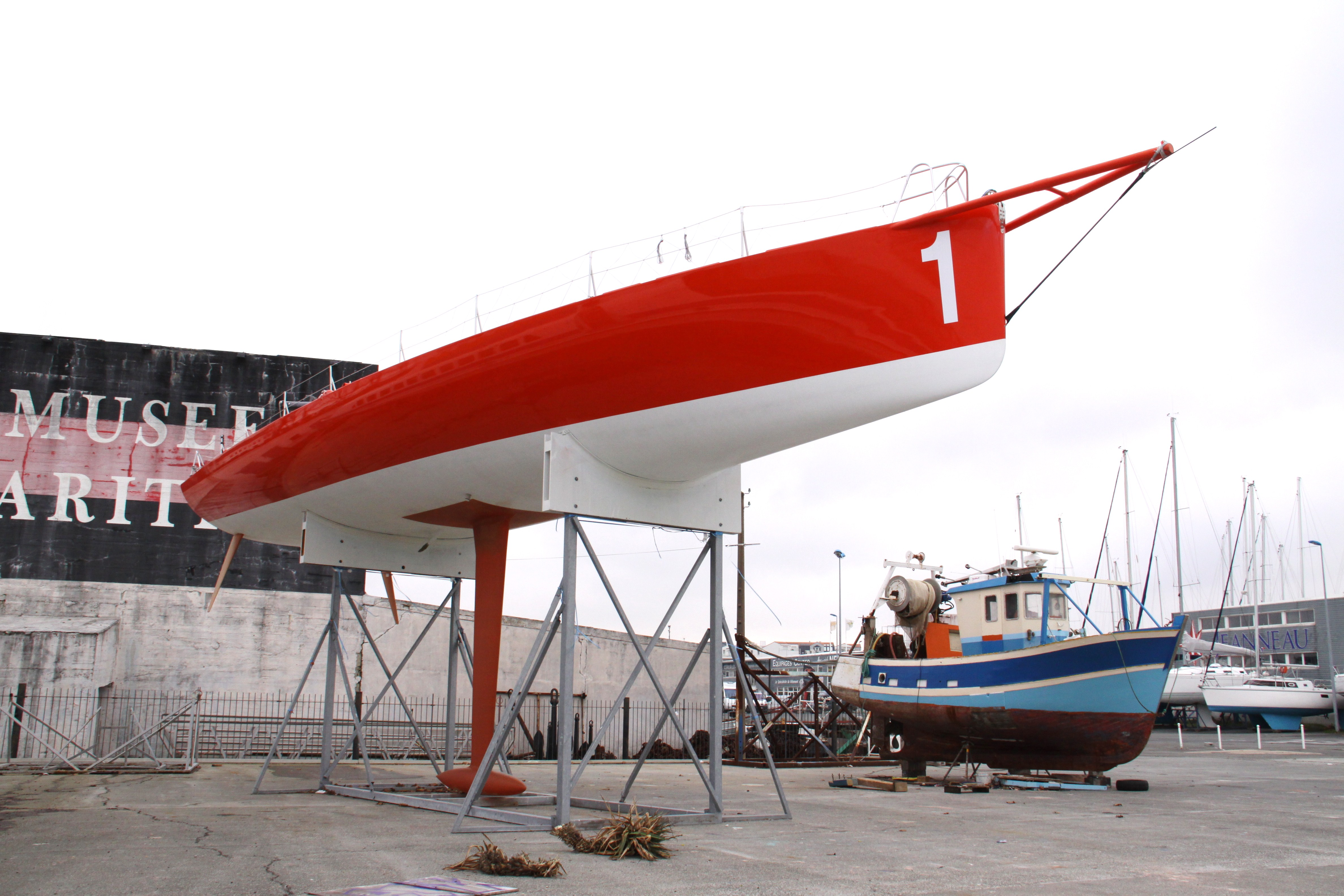 Un voilier de compétition reposant sur un ber (ou berceau) statique. La longueur importante de l' aileron de quille a dû faire utiliser un ber aux chandelles de plusieurs mètres de hauteur. Les parties supérieures du berceau sont équipées pour épouser parfaitement la forme de la coque du voilier. Pour les spécialistes: la quille de ce voilier de course n'est pas une quille pendulaire. La Rochelle (Plateau nautique de la Ville en Bois), Charente Maritime, France.